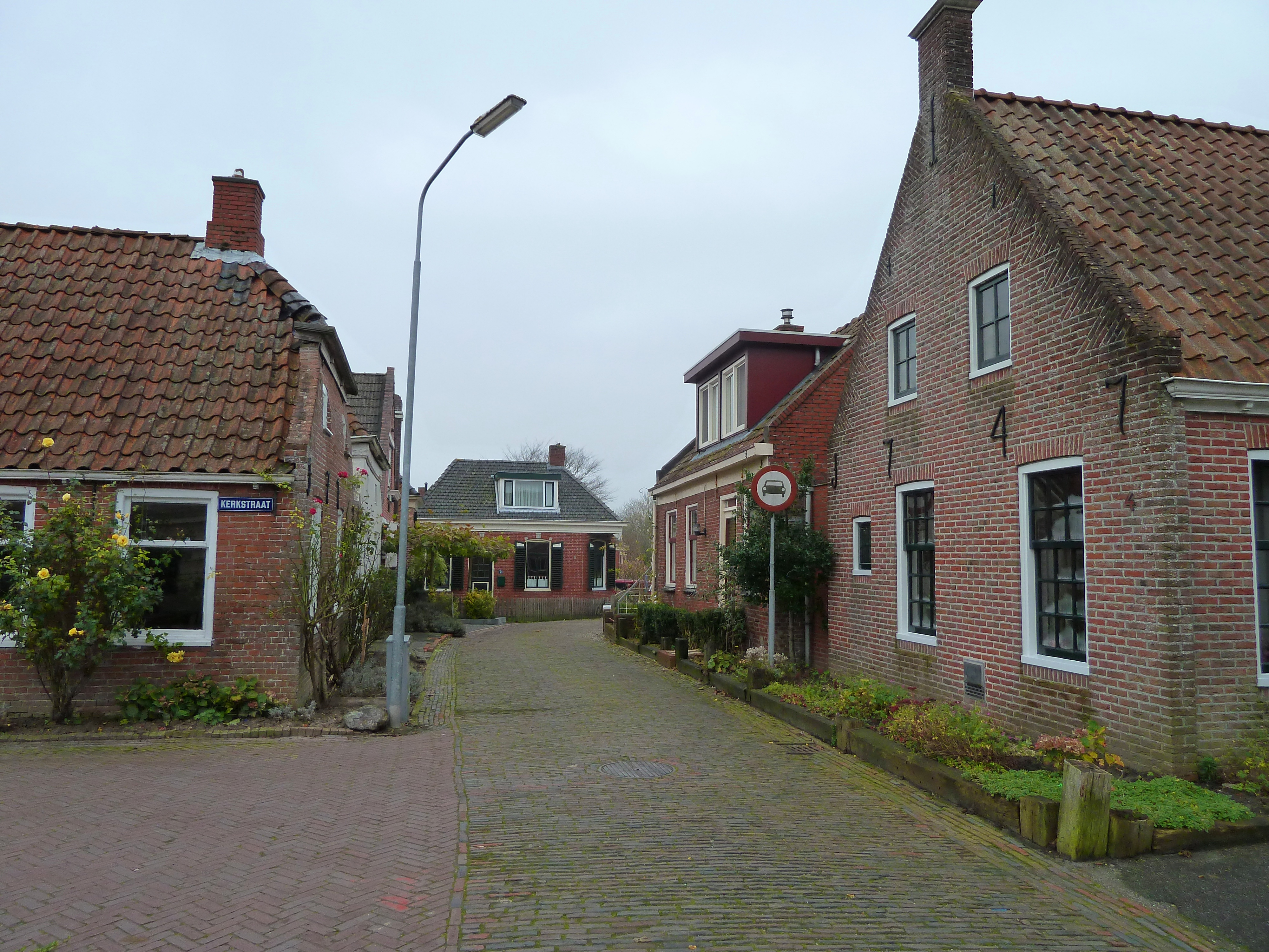 Gezicht op de Vissersstraat, een laatste restant van het oude centrum van Zoutkamp dat verder bijna volledig werd gesloopt tijdens een grote sanering door de gemeente Ulrum (nu gemeente De Marne) en deels overgebracht naar het Zuiderzeemuseum in Enkhuizen. Het huis links draagt het jaartal 1773 in de muurankers (niet goed zichtbaar), het huis rechts 1747.